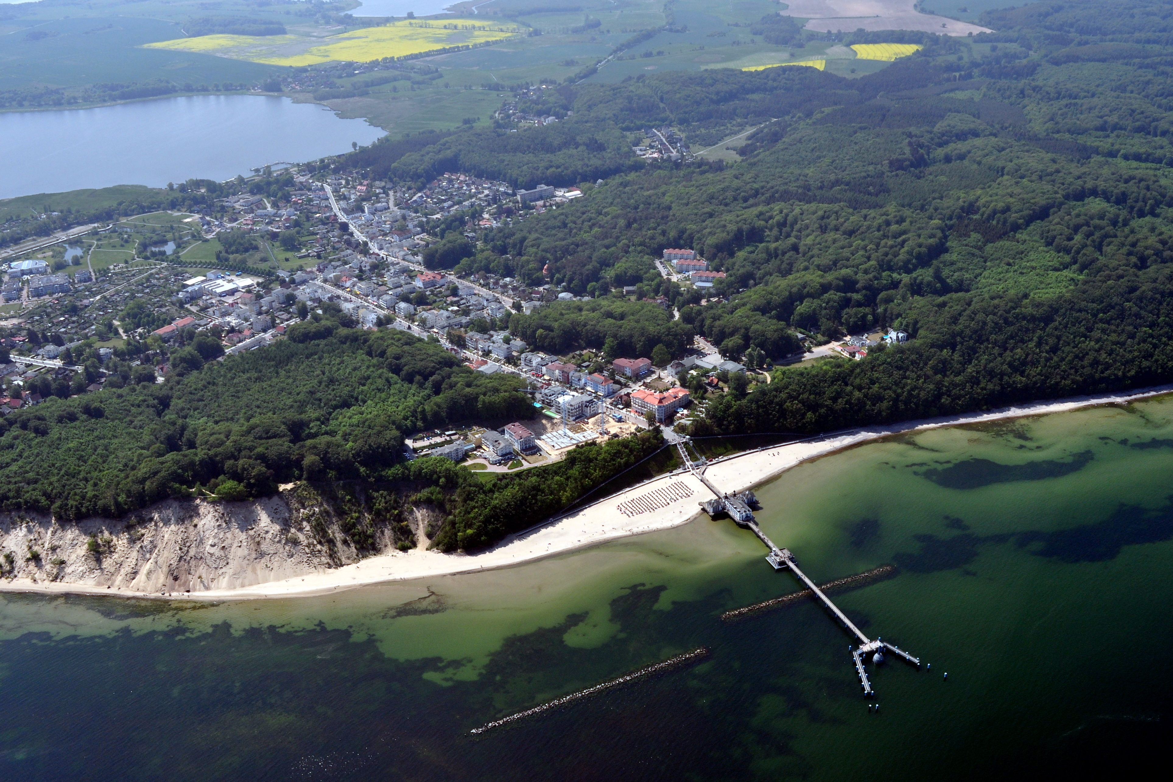 Die Bilder wurden von mir während eines einstündigen Rundflugs ab Flugplatz Güttin am 21. Mai 2011 aufgenommen. Die Bildbeschreibung steht im Dateinamen. Aufgenommen mit einer Nikon D5000 durch das Seitenfenster des Flugzeugs.